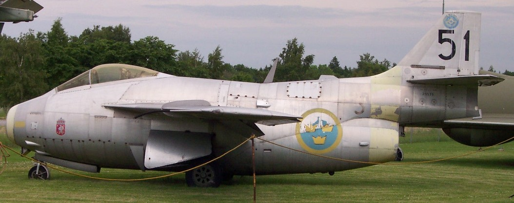 Saab J 29F Tunnan vid Flygvapenmuseum. Flygplansindividen är ursprungligen en Saab J 29B, och levererades den 18 augusti 1954 till F 3. Den 4 oktober 1954 överlämnades individen till FCS. Den 17 augusti 1955 överlämnades den till CVV för modifiering till J 29E. Den 1 oktober 1956 togs den in på Saab för modifiering till J 29F. Den 10 juni 1959 överfördes individen till F 16. Under 1964 märktes den om till 20-15. Den 13 juni 1968 överfördes individen till F 3, där den fick märkningen 3-51, och modifierades för målbogsering. Den 20 december 1974 kasserades individen i komplett skick, och överlämnades till Flygvapenmuseum.